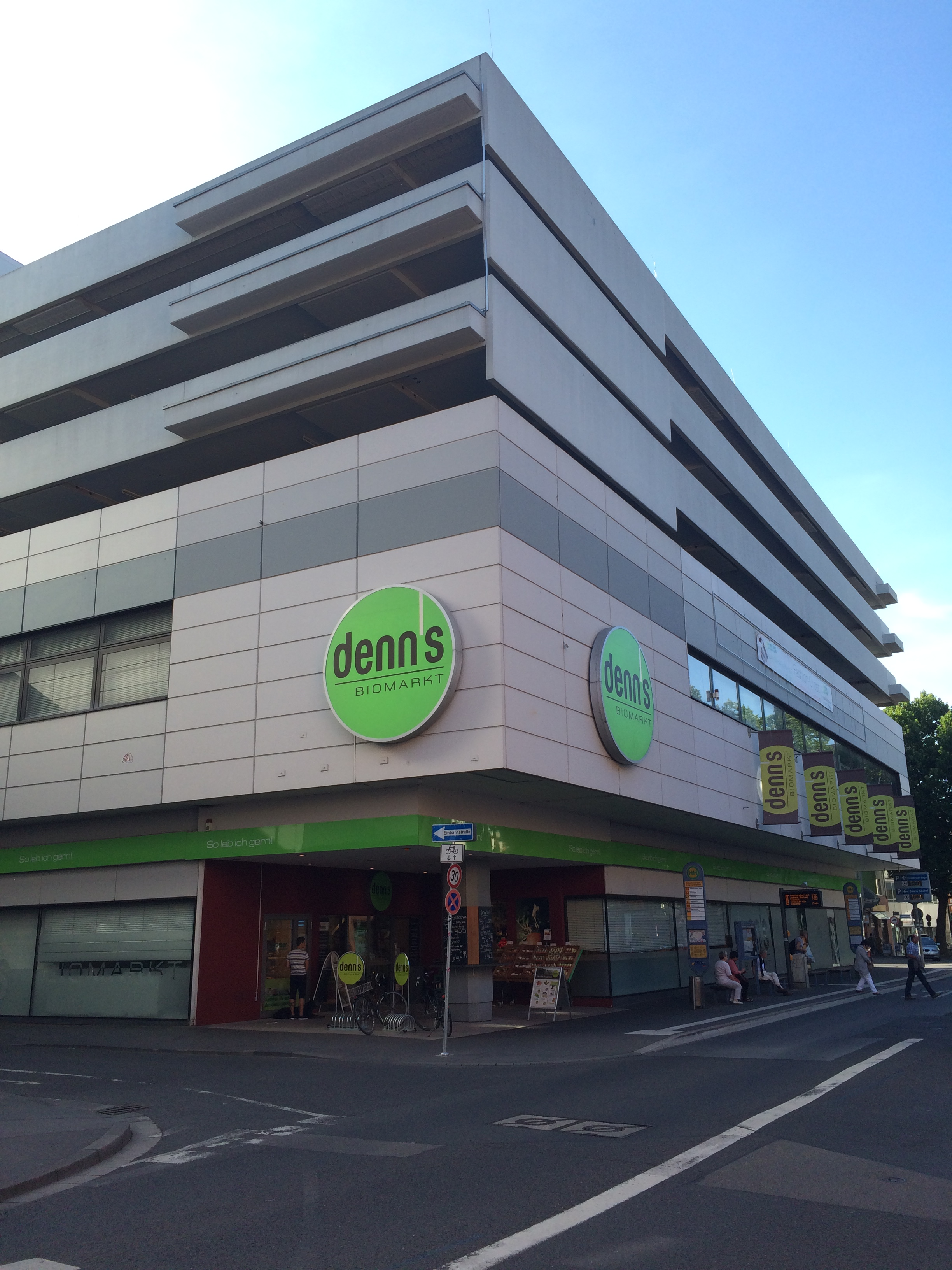 Denn's Biomarkt in Mainz